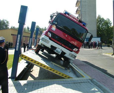 Badania samochodów strażackich